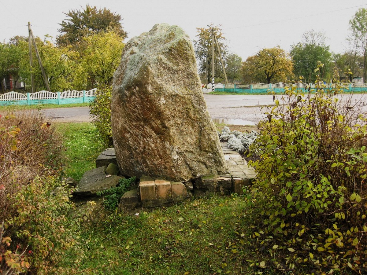 Фарны Канец. Фарнаканецкі валун